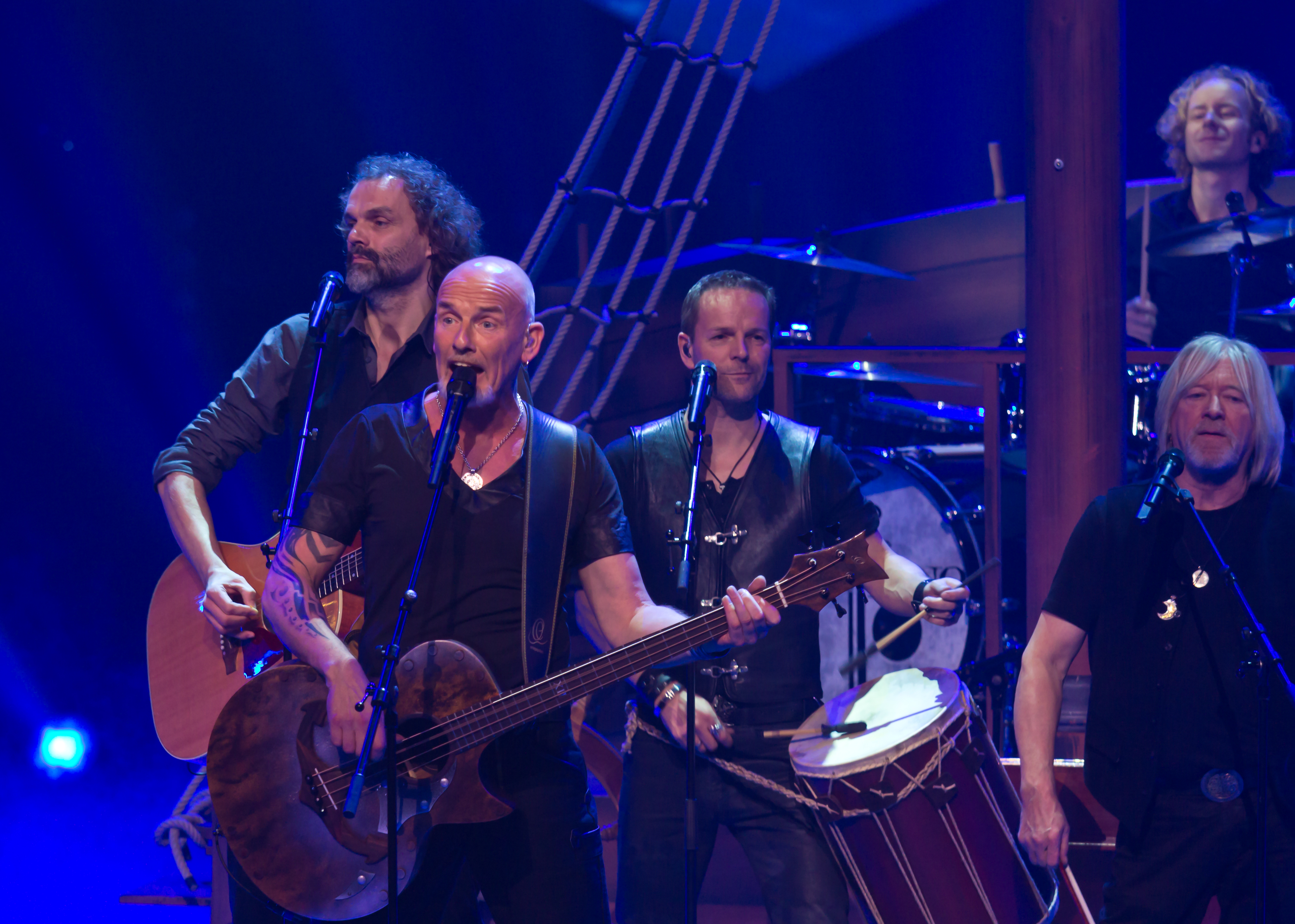 Unser Song für Dänemark - Livesendung Foto: Auftritt von Santiano